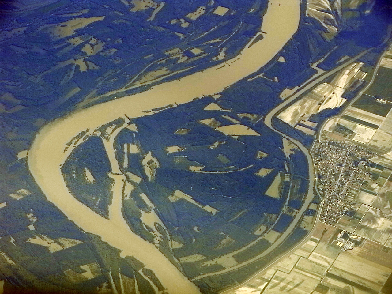 Die Donau bei Szeremle (rechts).